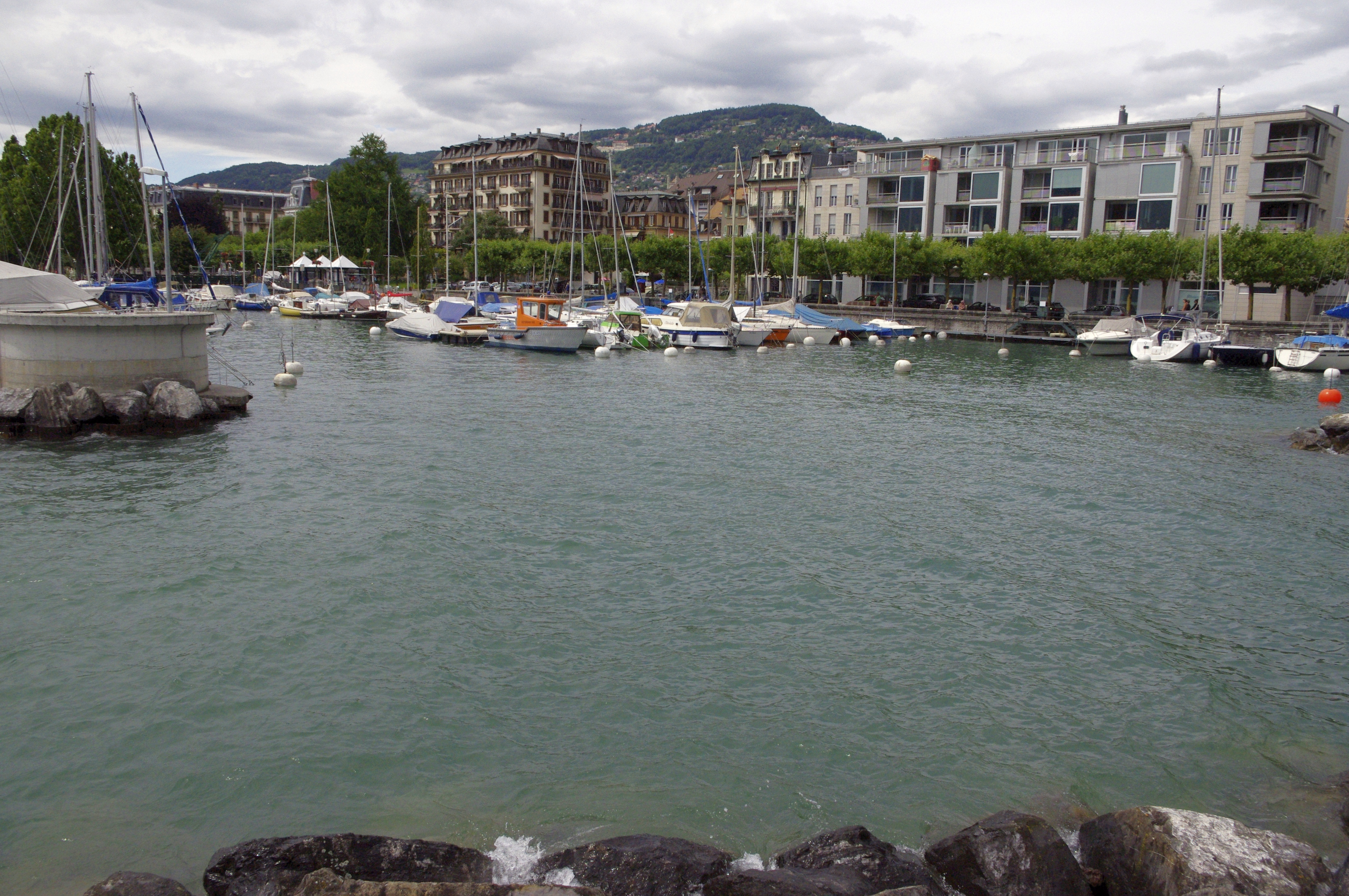 Port de Vevey, Suisse